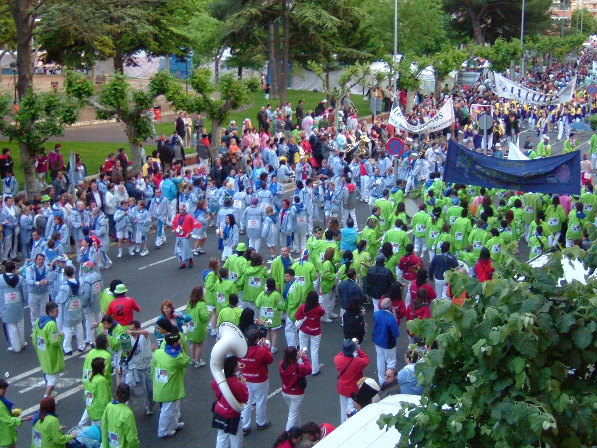 Desfile San Juan del Monte - Miranda de Ebro - Spain